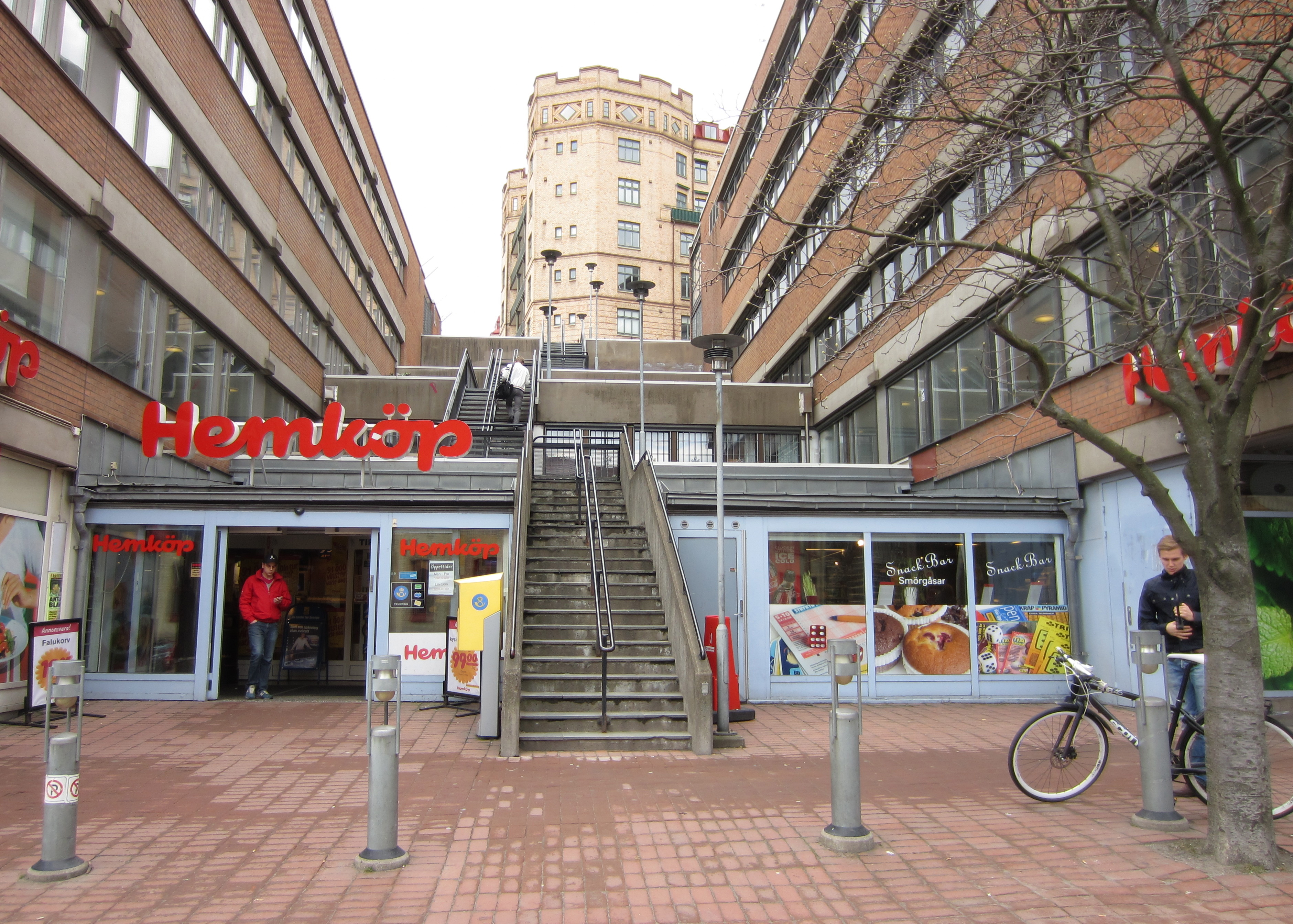 Artilleristen Gladers Trappor går börjar vid Arsenalsgatan och går ner till Hvitfeldtsplatsen i Göteborg.